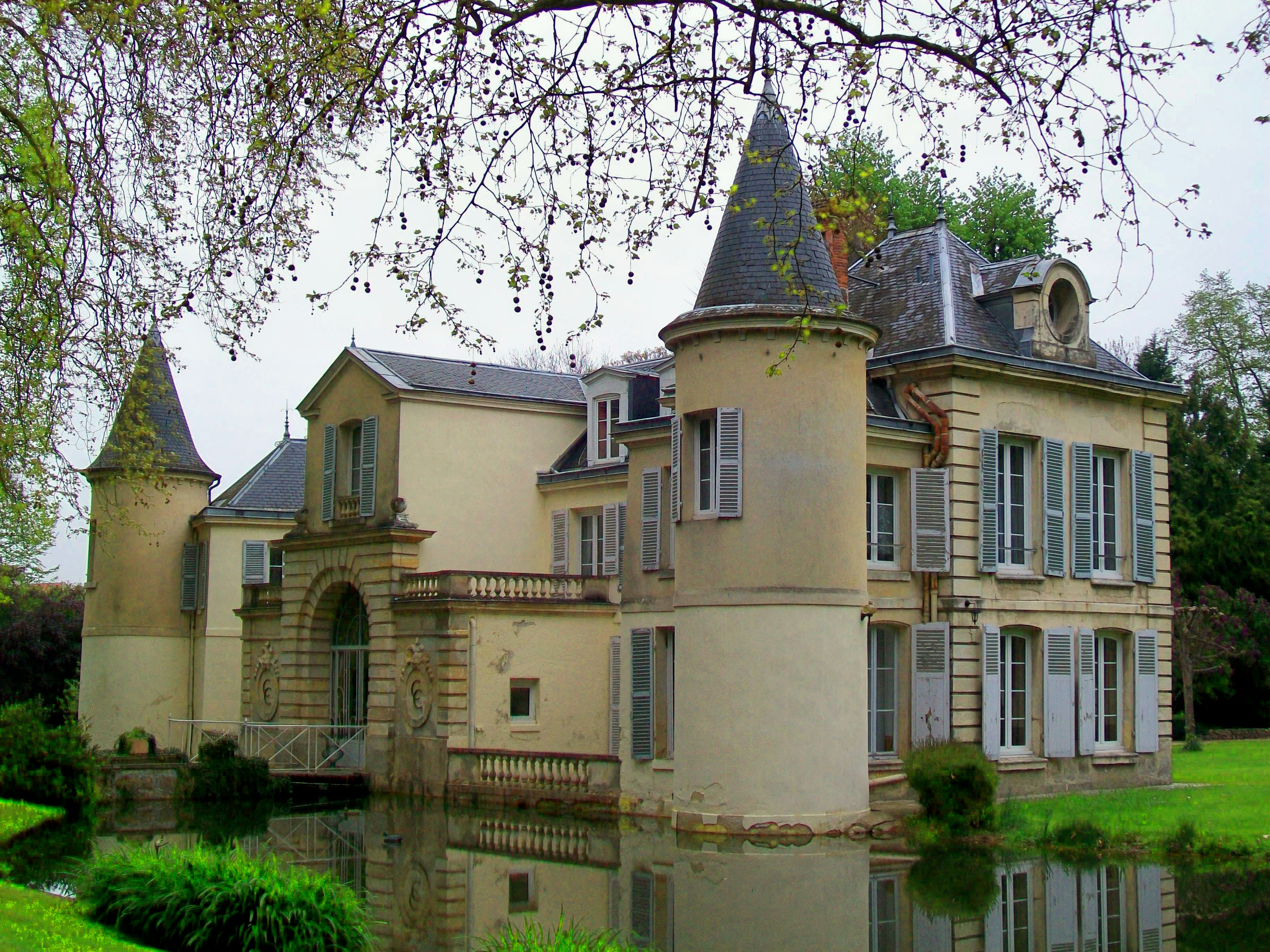 Le manoir du Preslay du XIXe siècle, aujourd'hui hôtel-restaurant.